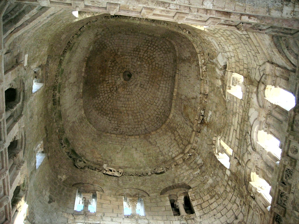 Monte Sant'Angelo - Tomba di Rotari, soffitto